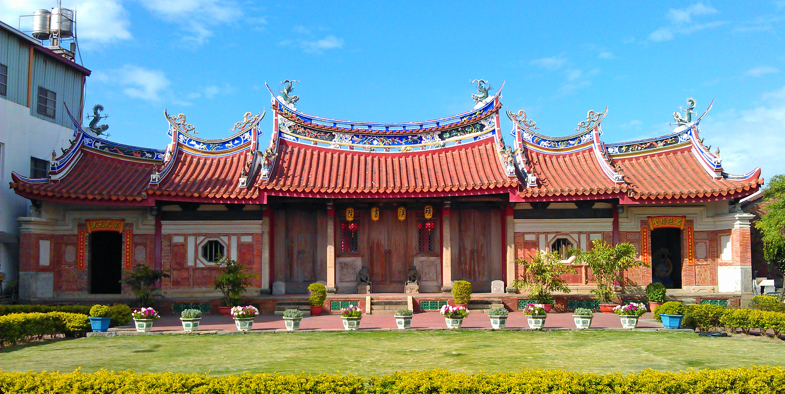 中文（台灣）: 大肚磺溪書院